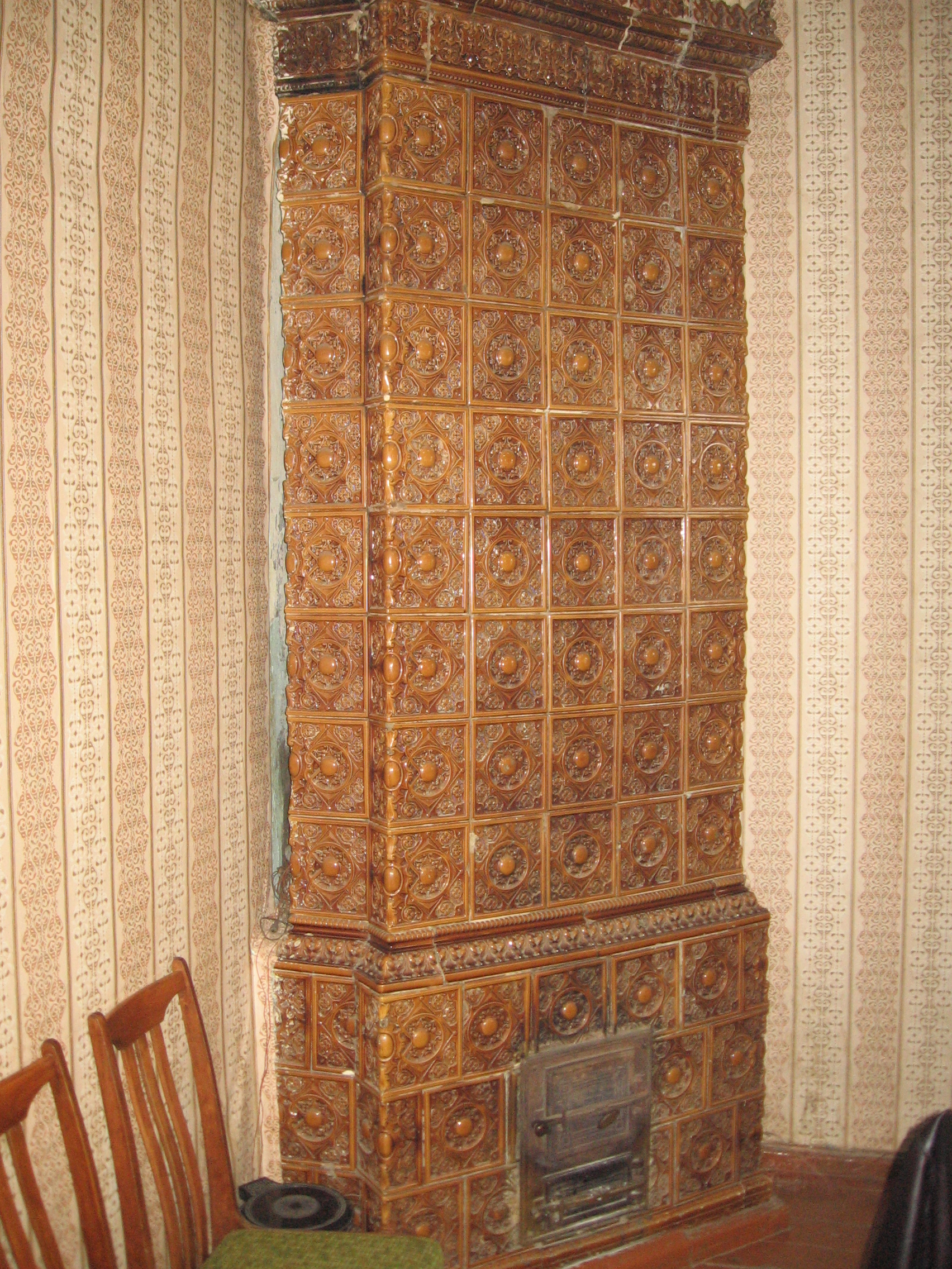 Беларуская (тарашкевіца): Былая сядзіба Трамбіцкіх (Інтэрнацыянальны). Печ. This is a photo of Belarusian heritage monument. Reference number: 113Г000610 ( WLM)